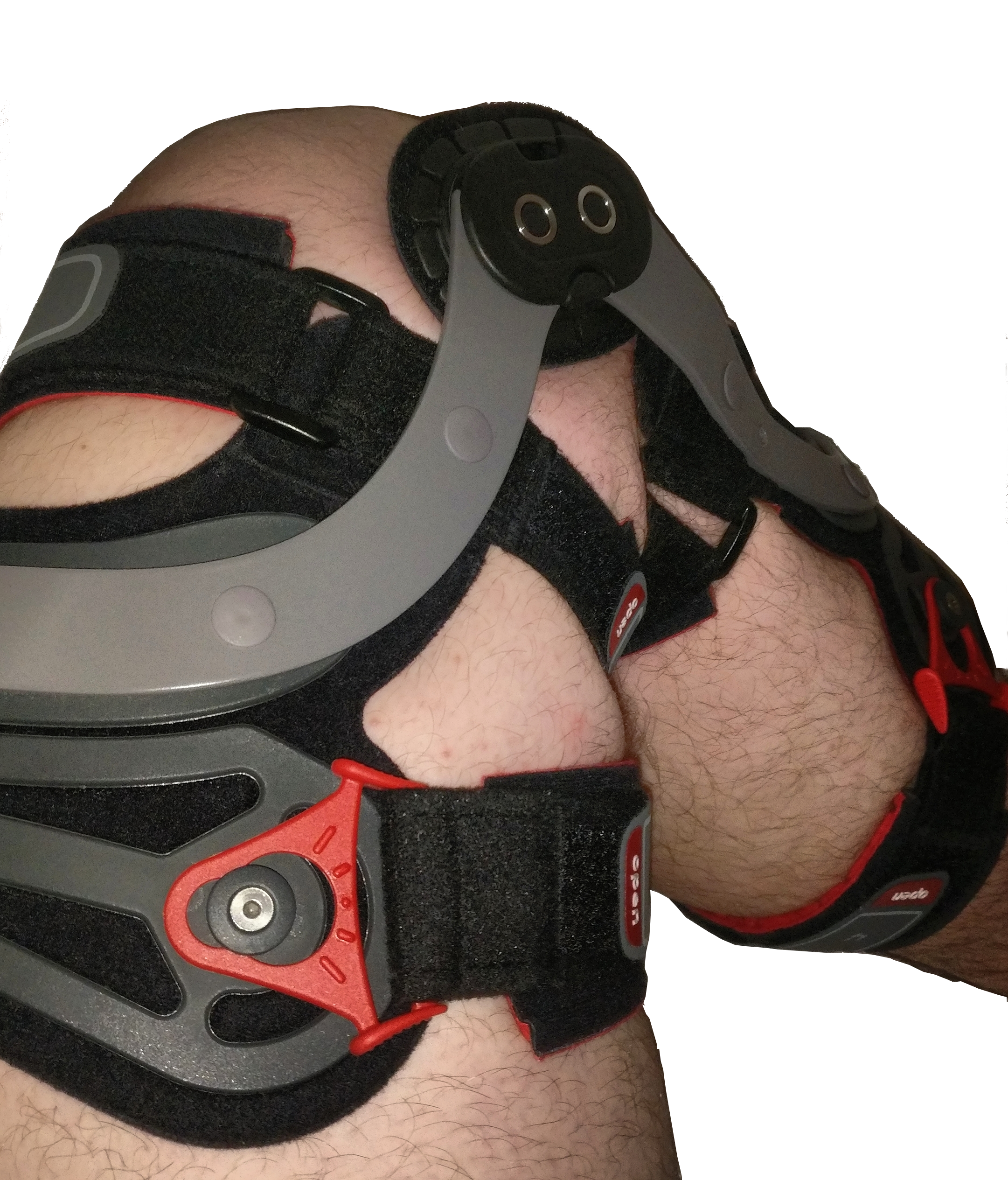 Knieorthese bei Kreuzbandriss